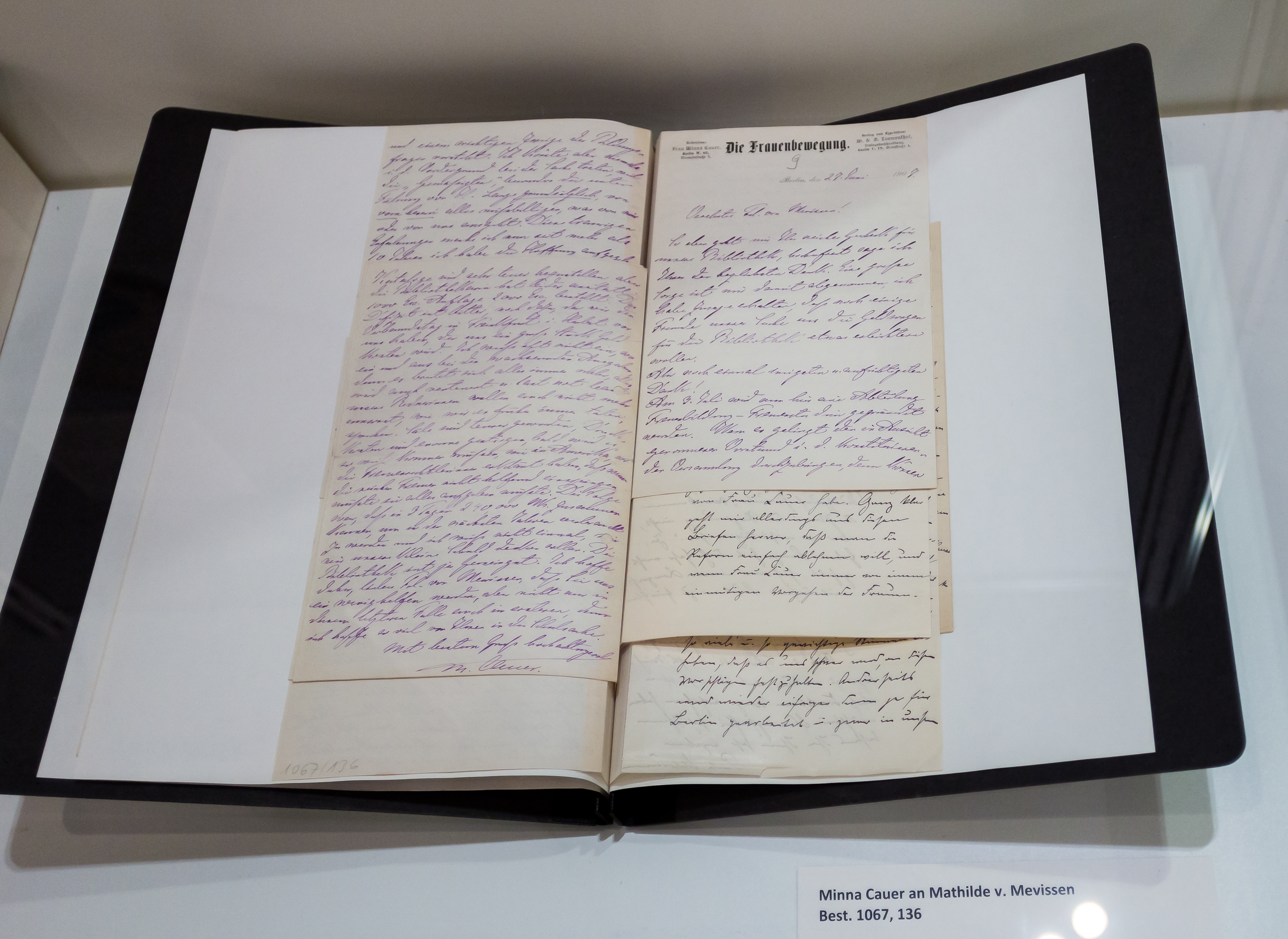 Ausstellung „Aufgepasst Patenkinder! – Ein Projekt für Vergangenheit und Zukunft“ des Historischen Archivs der Stadt Köln Foto: Brief von Minna Cauer an Mathilde von Mevissen vom 27. Juni 1907. Best. 1067, 136 Die Patenschaft zur Übernahme der Restaurierungskosten erfolgte durch die Frauen-Serviceclubs Köln.